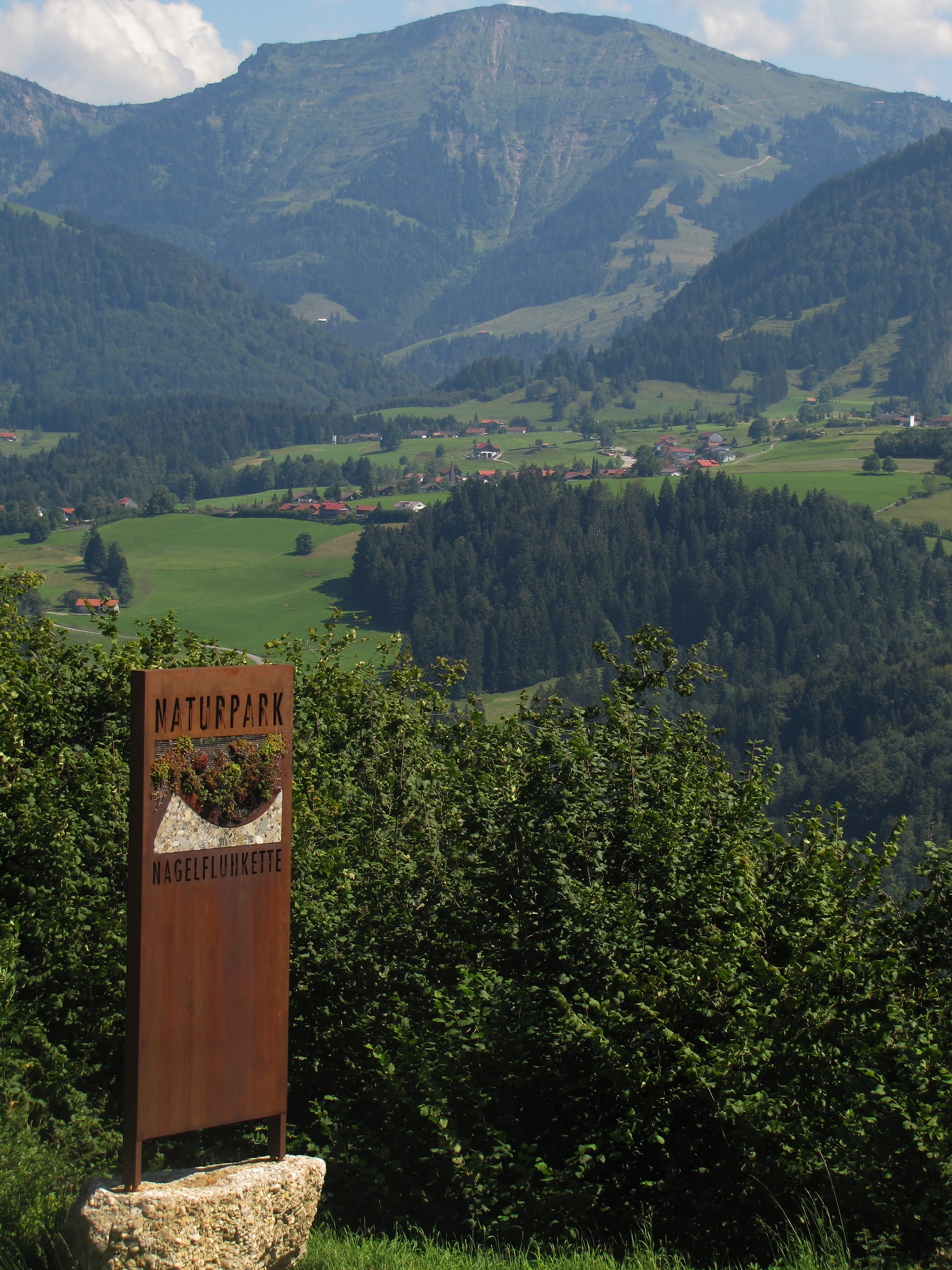 Naturpark Nagelfluhkette an der B 308, dahinter Steibis (861 m) und der Hochgrat (1834 m).